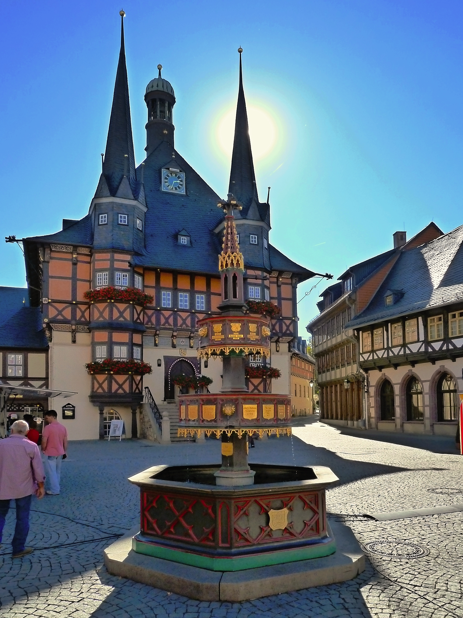 Rathaus und Marktbrunnen in Wernigerode